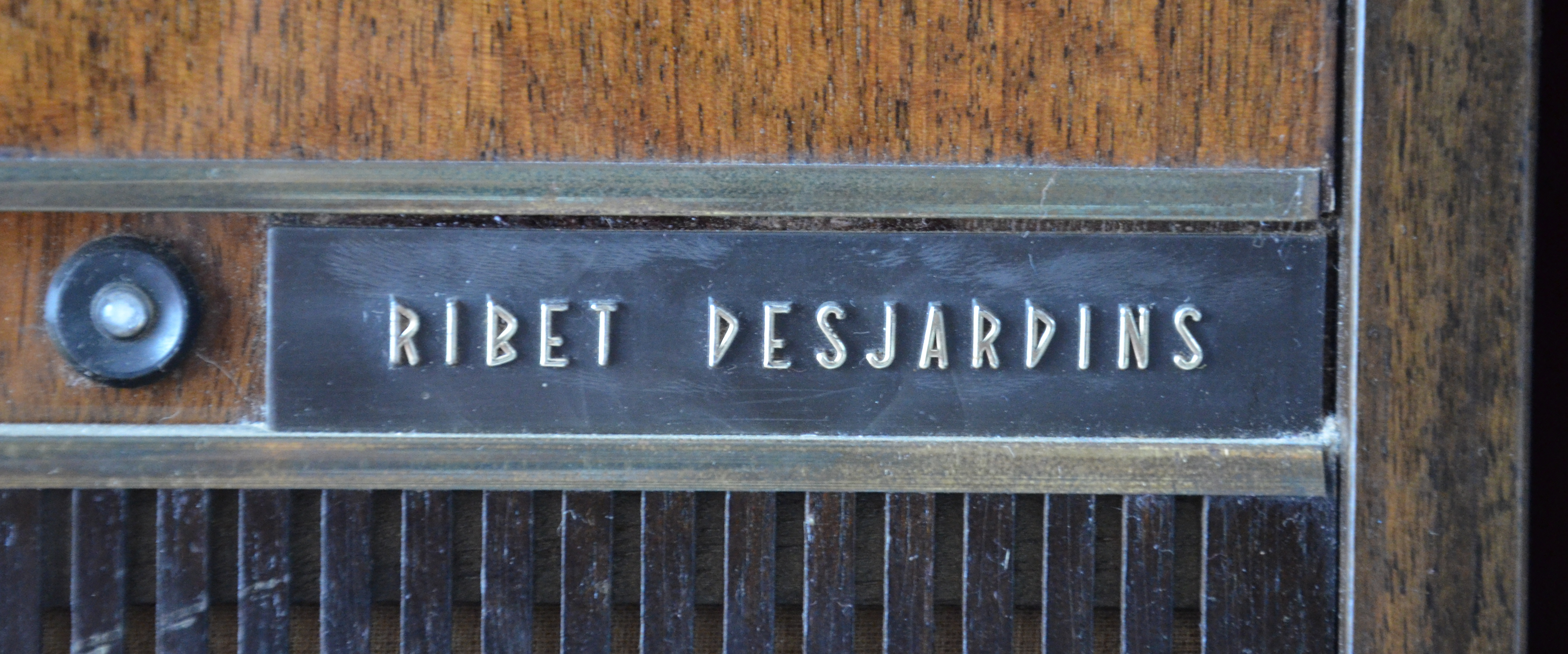 Marque Ribet Desjardins sur un appareil radio-phono Mozart 3 de 1963.